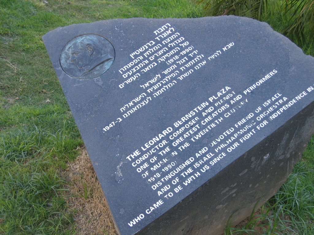 Fredric R. Mann Auditorum in Tel aviv היכל התרבות בתל אביב